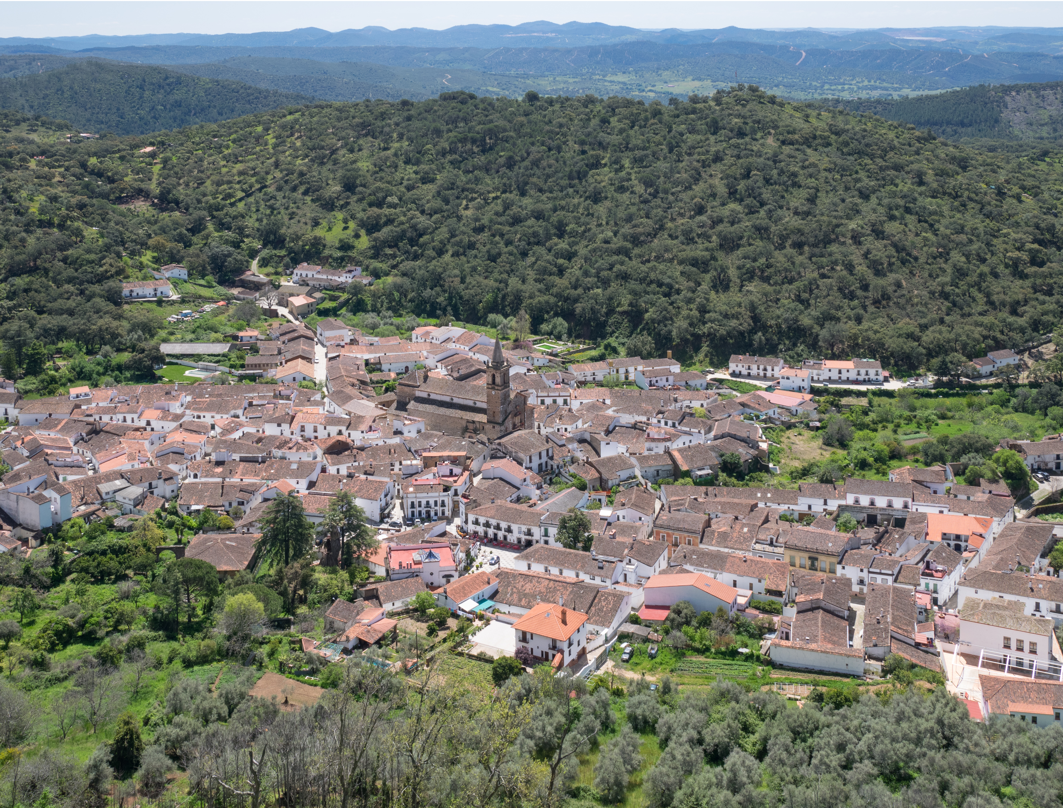 Alájar, visto desde La Peña. Huelva, Andalucía, España